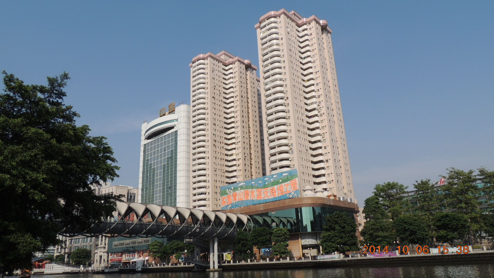 Fuhua Road, Zhongshan, Guangdong, China, 528400